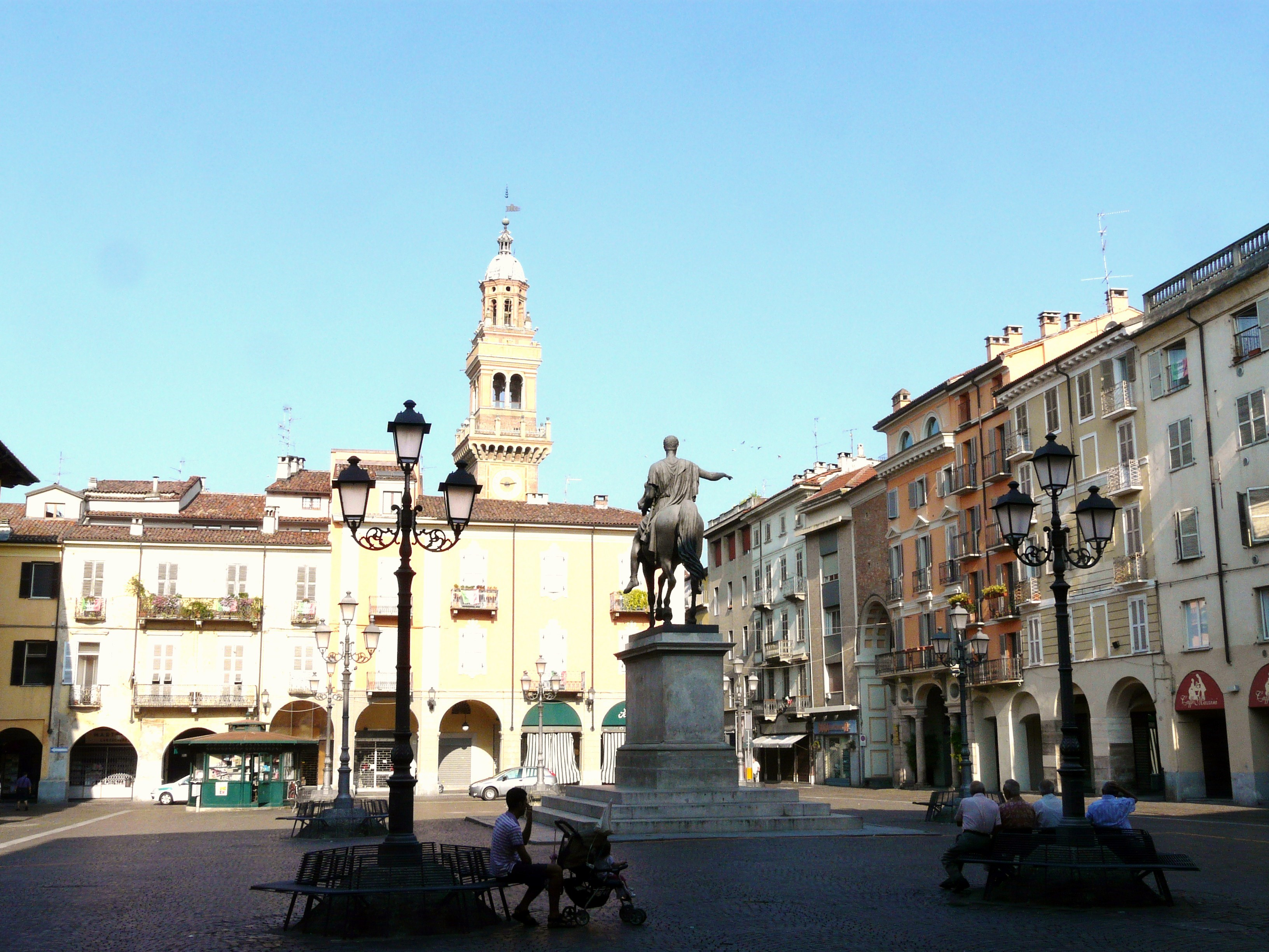 Piazza Giuseppe Mazzini, Casale Monferrato, Piemonte, Italia